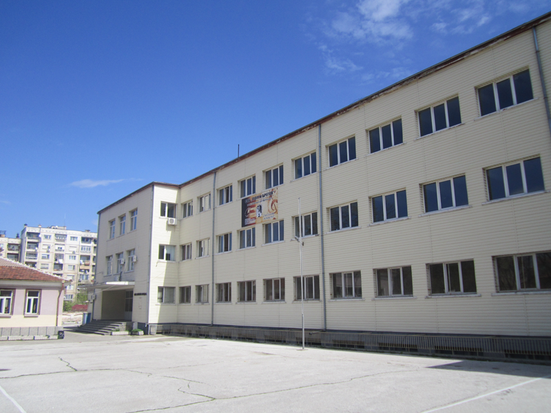 Централна сграда на СОУ „Георги Брегов“ днес.